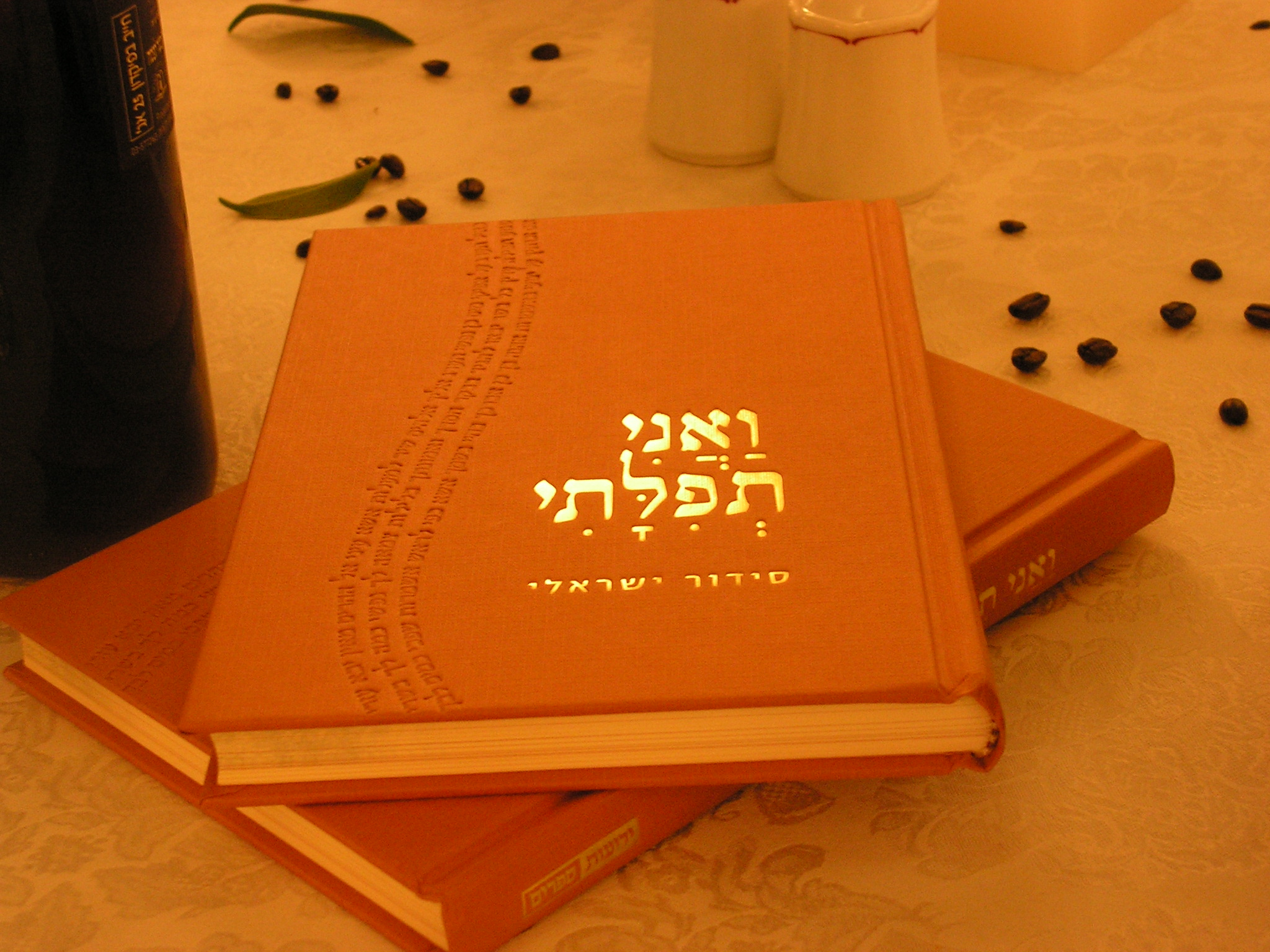 ואני תפילתי-סידור ישראלי